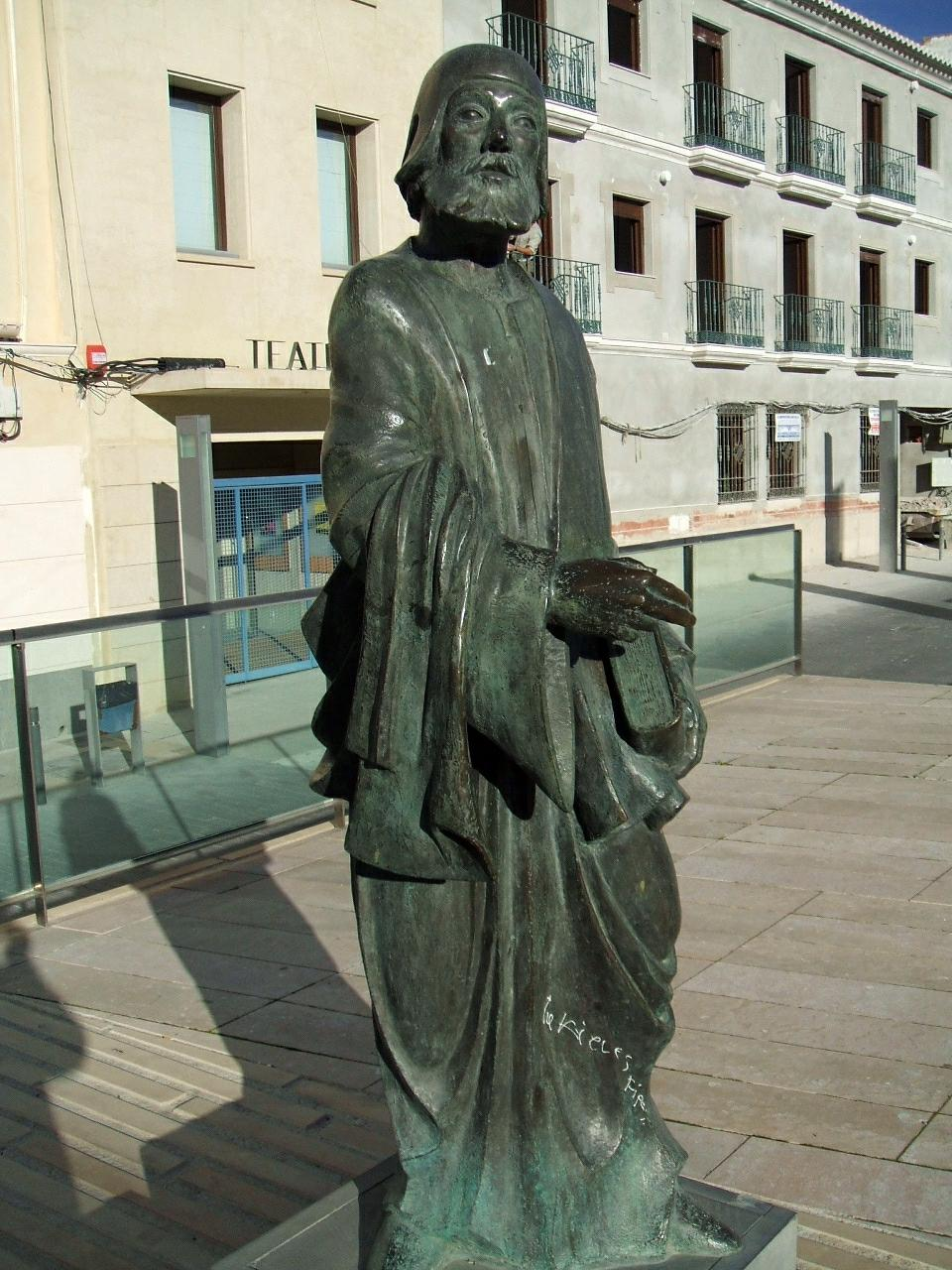 Estatua de bronce de Juan Alfonso de Baena en la plaza del Ayuntamiento de Baena